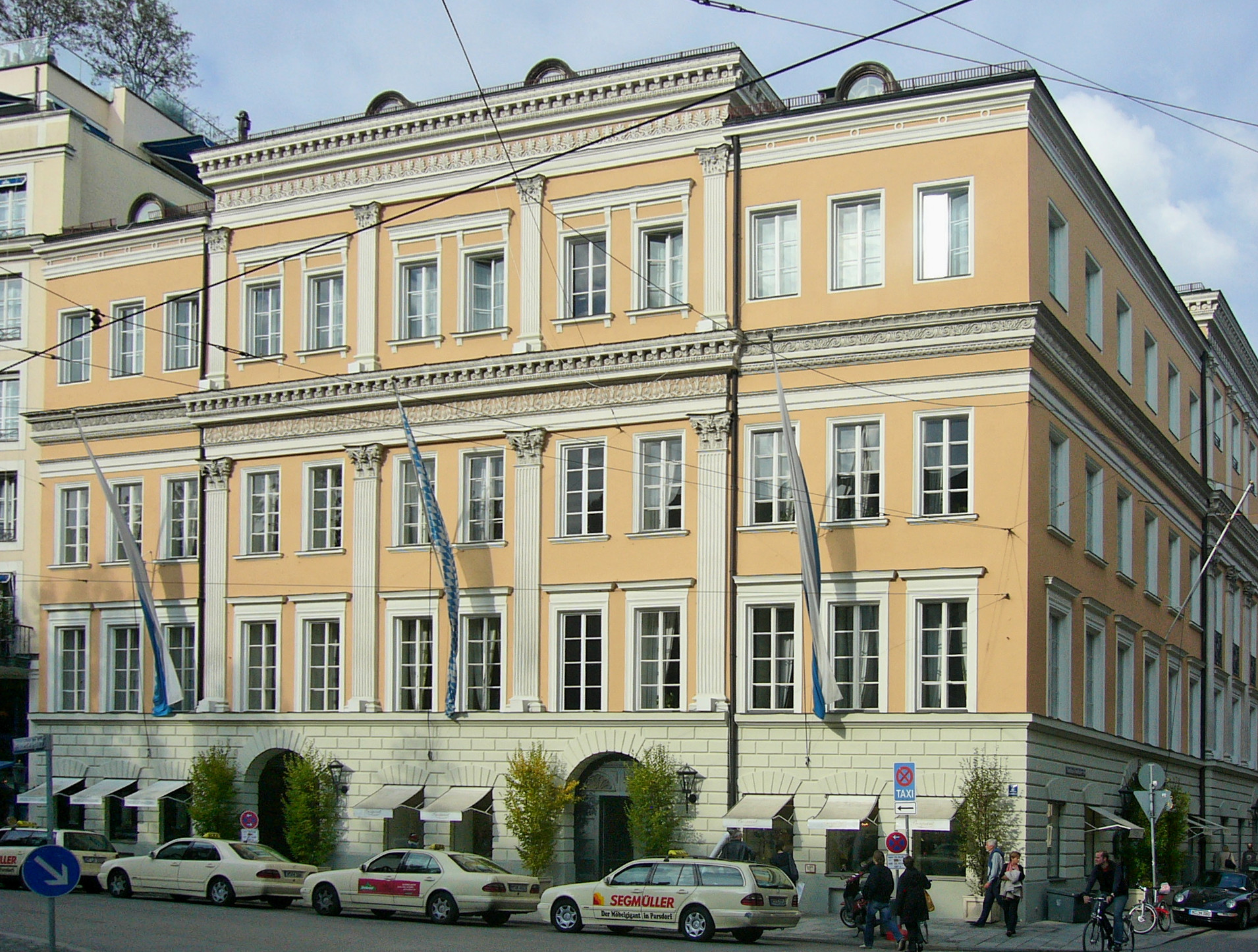 Palais Montgelas (Promenadeplatz/Kardinal-Faulhaber-Str.) in München, heute Teil des Hotels Bayerischer Hof.